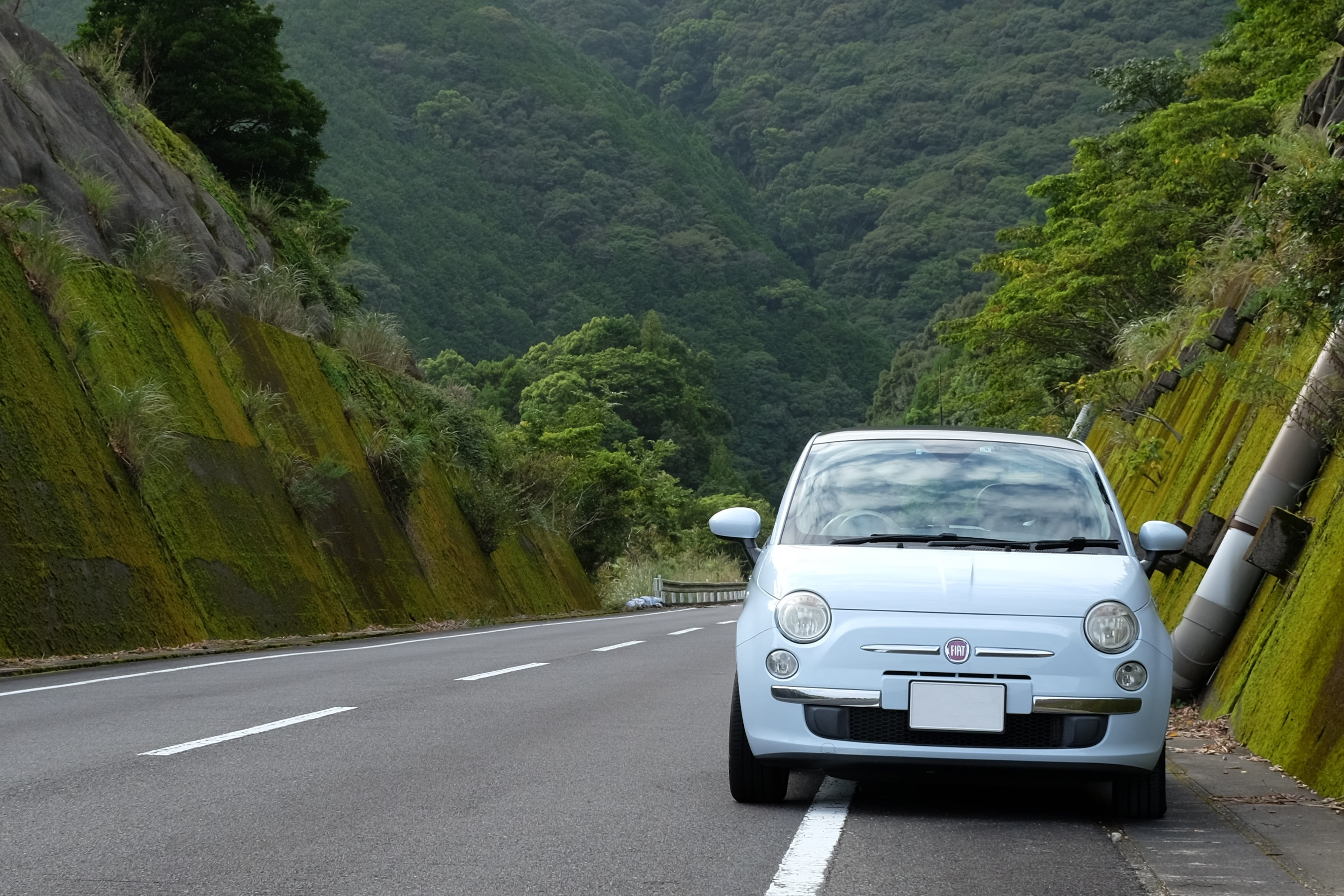 Fiat 500 1200 ラウンジ Color チャチャチャアズール